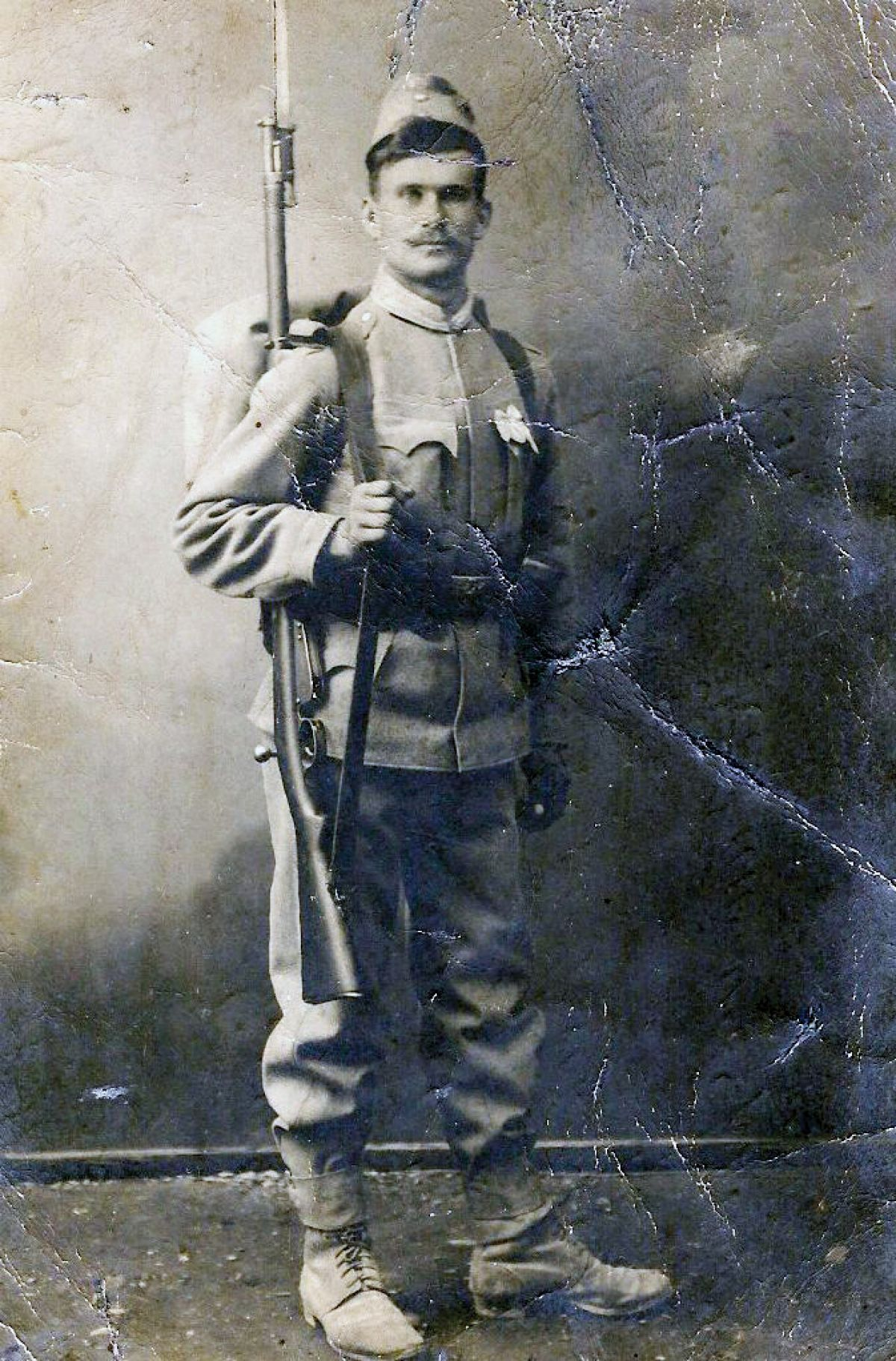 Anton Jurečič se je kot 27-letni vojak K.u.k. Infanterie Regiment No 17 (“Kranjski Janezi”) fotografiral sredi septembra 1914.